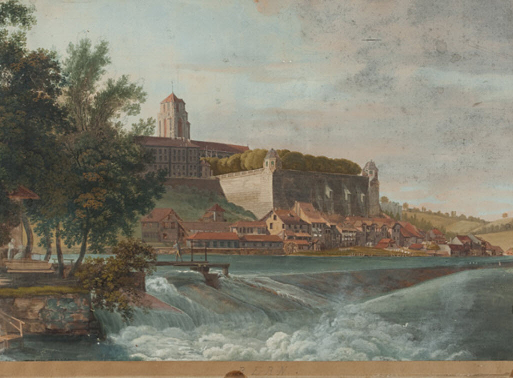 Bern, Ansicht von Südwesten auf Münster, Stiftsgebäude, Plattform, Matte und Aare.